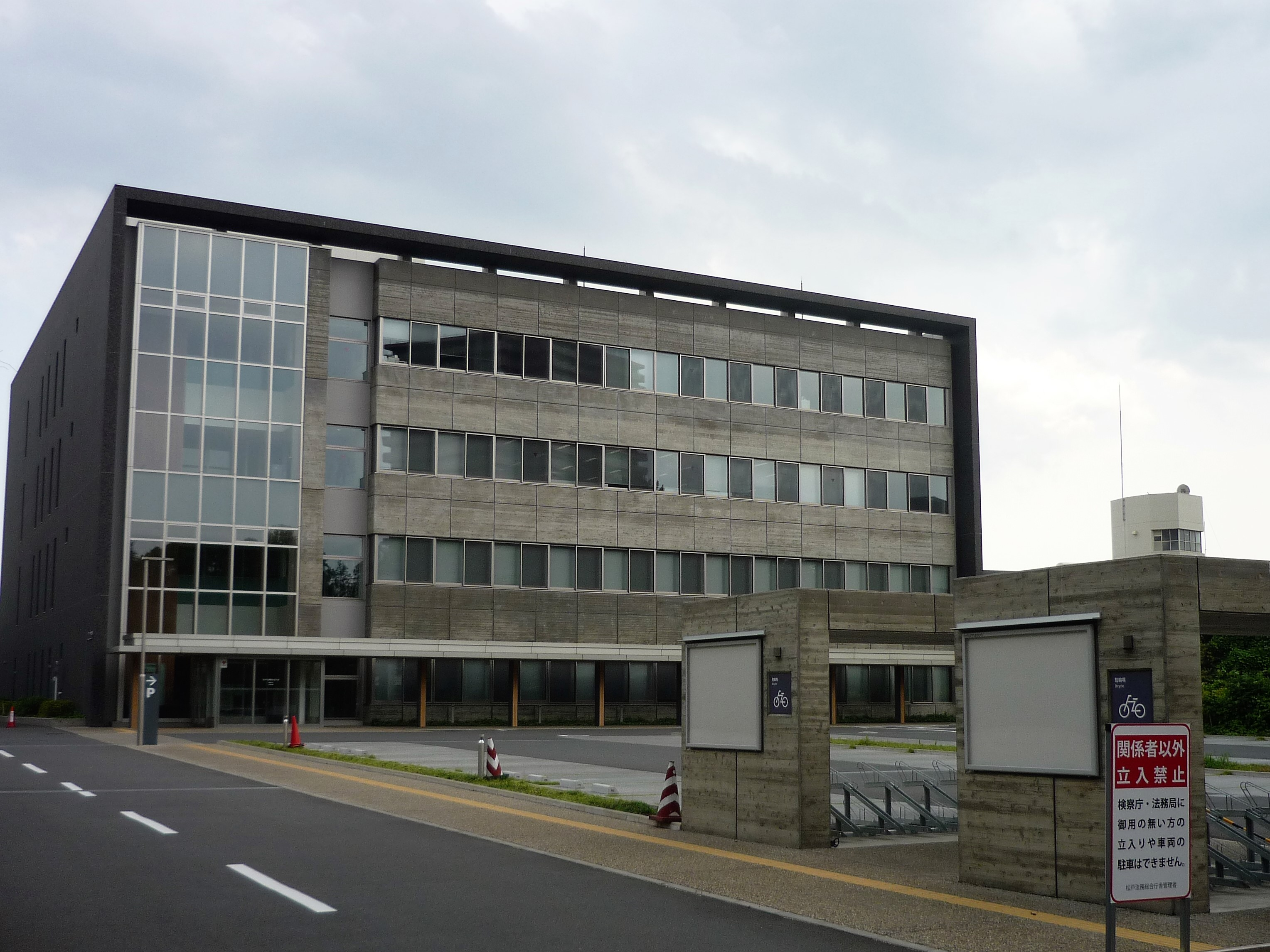 松戸法務総合庁舎（千葉地方検察庁松戸支部、松戸区検察庁、千葉地方法務局松戸支局）